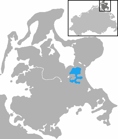 Mecklenburg-Vorpommern, Kleiner Jasmunder Bodden Bay, near Bergen auf Rügen (marked blue)